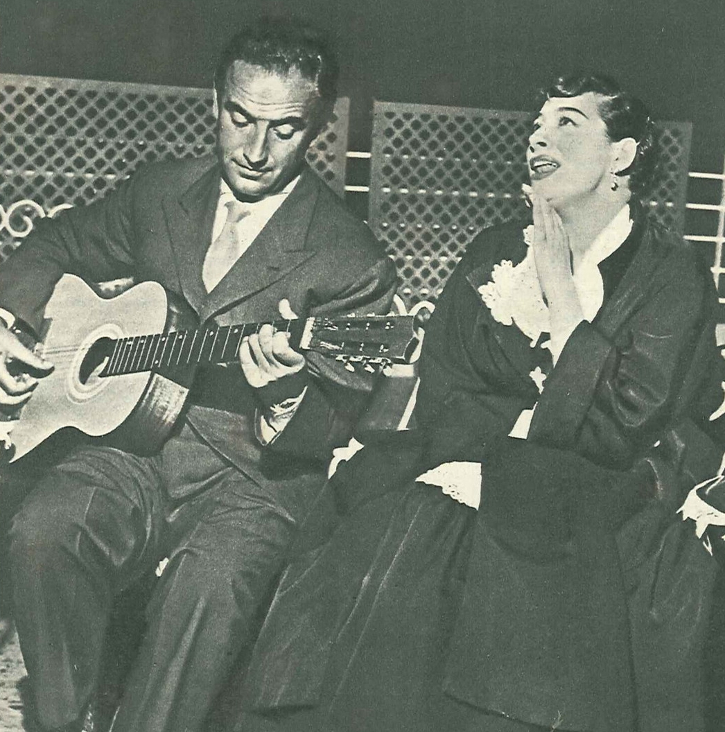 Katyna Ranieri canta accompagnata alla chitarra dal celebre compositore napoletano Ugo Calise (foto scattata a Napoli nel 1956) Licenza Ranieri, Katyna